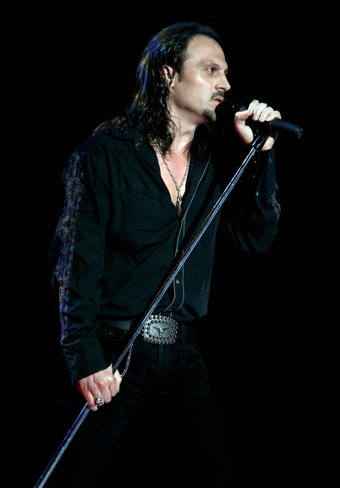 Gent Demaliaj ne nje nga koncertet e tij.